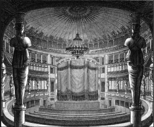 gravure